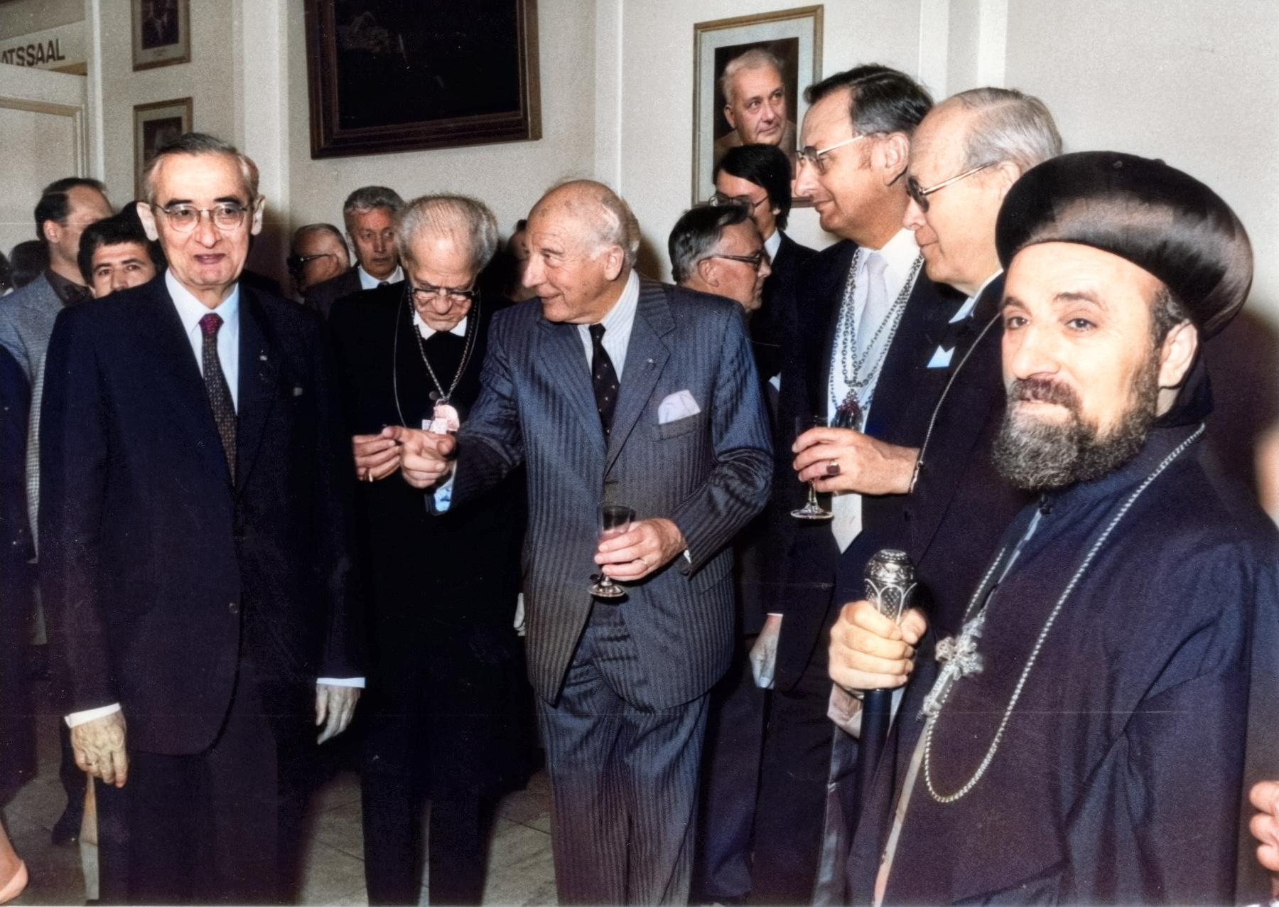 Foto colorizada de outra imagem de Kurt Aland que já está sob licença pública.